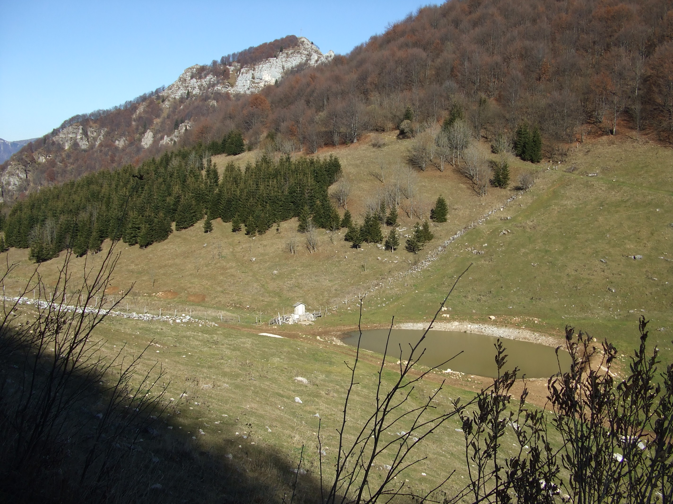 Novegno, passo di Campedello and monte Priaforà